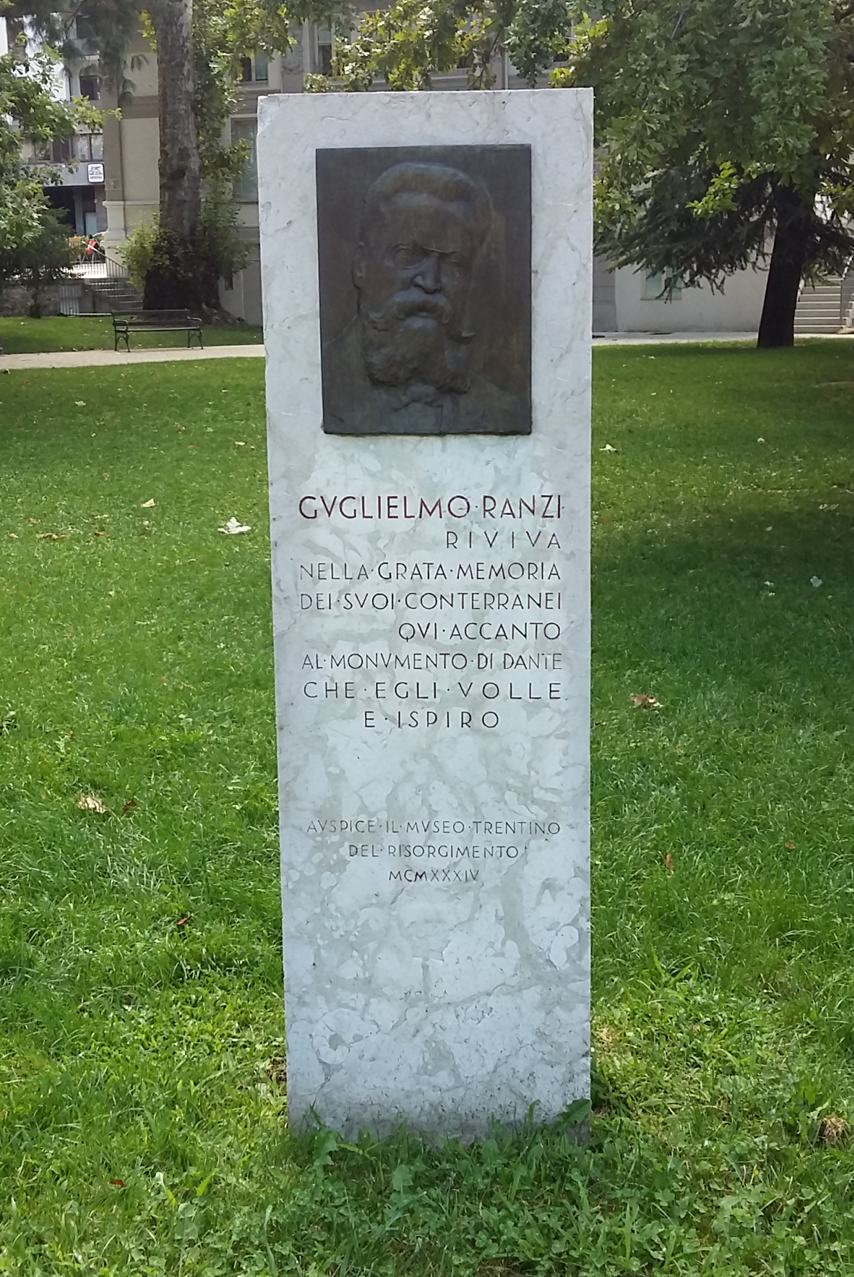 Stele a Guglielmo Ranzi in Piazza Dante a Trento. This is a photo of a monument which is part of cultural heritage of Italy.